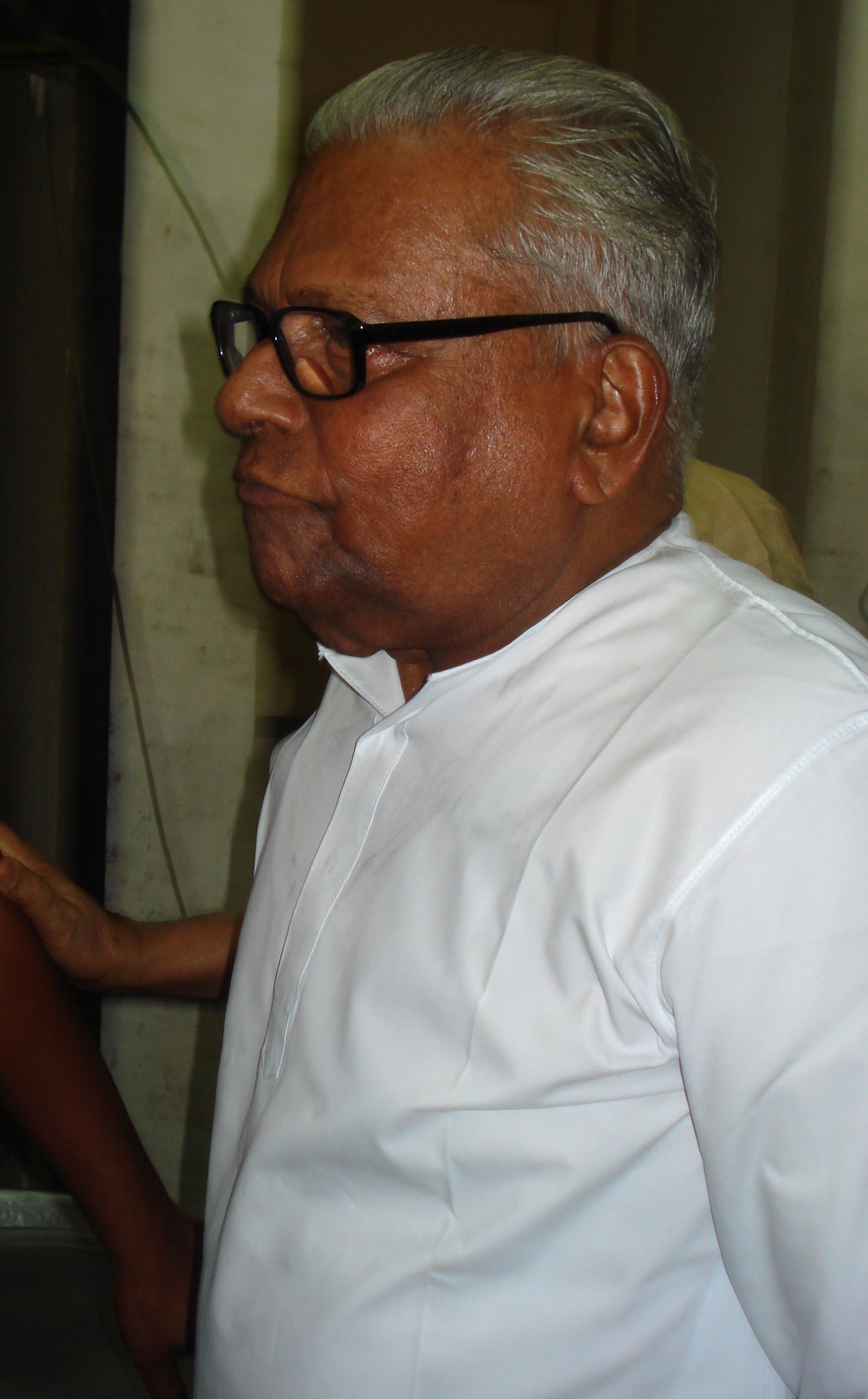 വി.എസ്. അച്യുതാനന്ദൻ കോട്ടയത്ത് ഖാദി ബോർഡ് ജീവനക്കാരുടെ സംസ്ഥാനസമ്മേളനത്തിൽ പങ്കെടുത്ത ശേഷം - 2011 ജൂലൈ 3